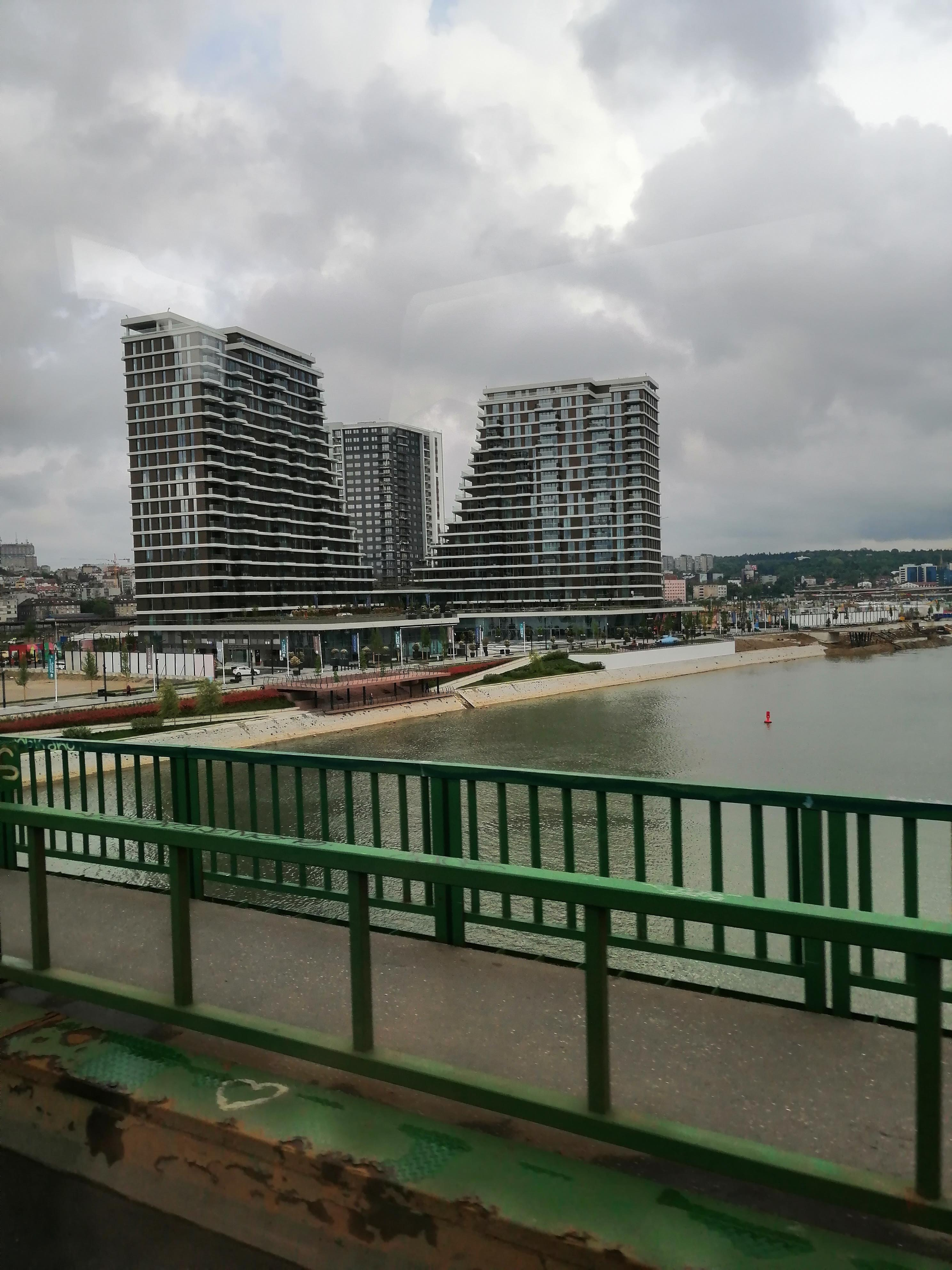 Srpski (latinica): Beograd na vodi